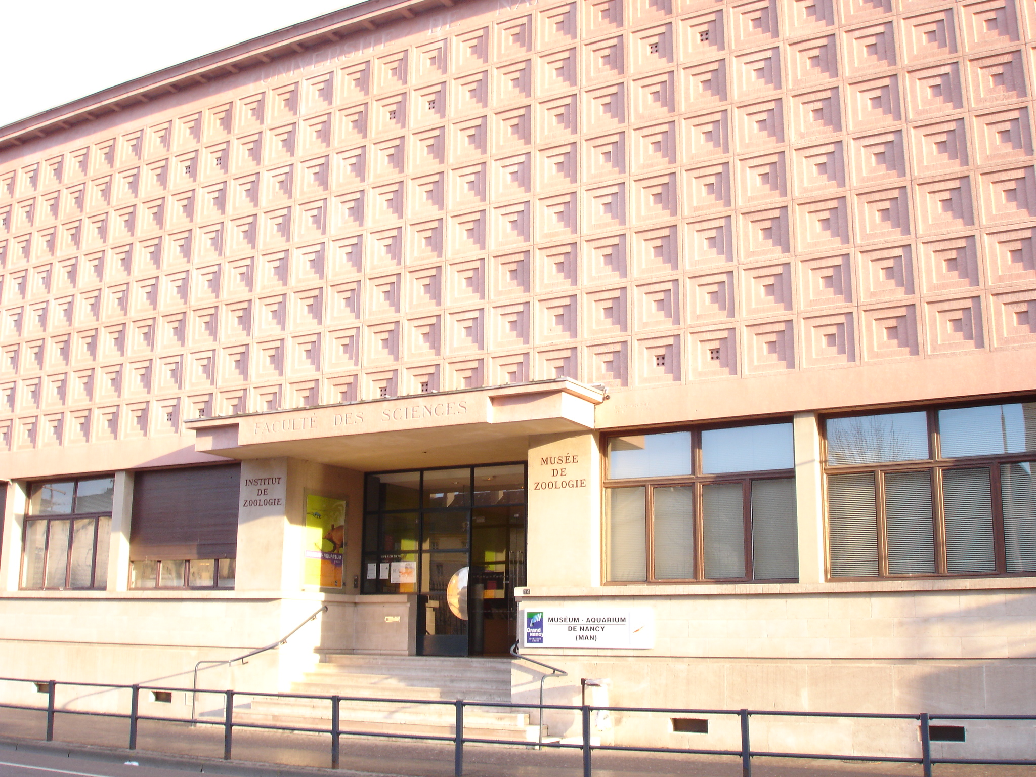 façade rue ste catherine du Muséum-Aquarium de Nancy Map: 48° 41' 41" N 6° 11' 18" E